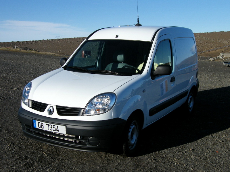 Photo d'une immatriculation des TAAF Ile de Kerguelin